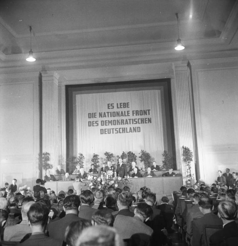 ADN-ZB/Zühlsdorf Gründung der Deutschen Demokratischen Republik am 7.10.1949 Im Gebäude der DWK (Deutsche Wirtschafts Kommission) in Berlin Leipziger Straße wählten am 11. Oktober 1949 die Provisorische Länderkammer und die Provisorische Volkskammer einstimmig Wilhelm Pieck zum Staatspräsidenten der Deutschen Demokratischen Republik. UBz: Übersicht während der Rede des Staatspräsidenten Wilhelm Pieck, daneben [rechts] der Präsident der Provisorischen Volkskammer Johannes Dieckmann.